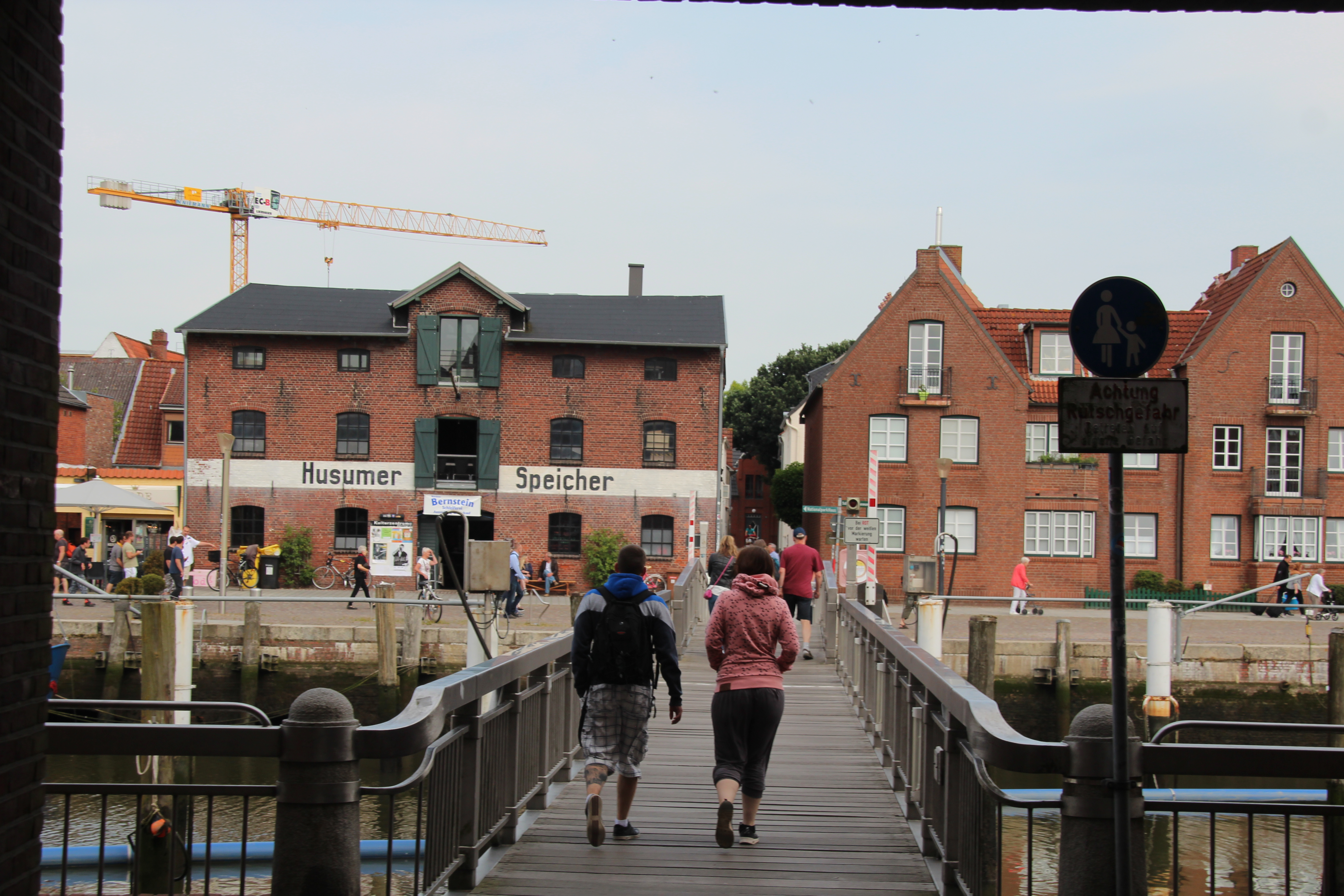 Gangbroen over Husum havn